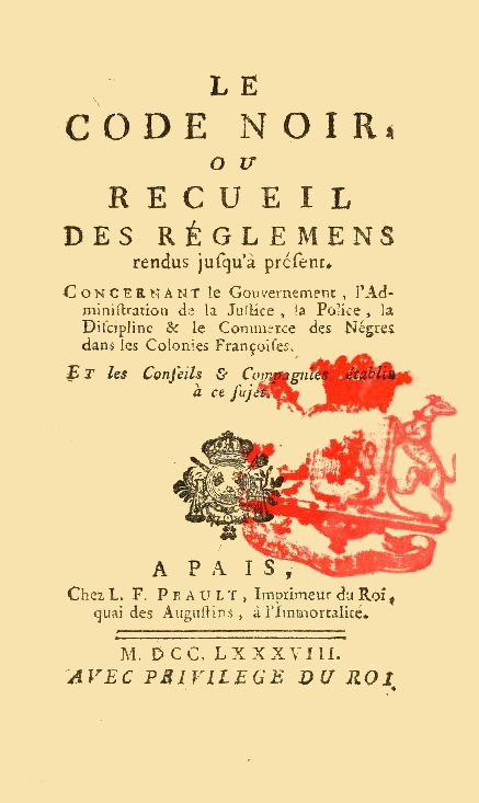 Page de titre : Le code noir, ou, Recueil des réglemens rendus jusqu'à présent : concernant le gouvernement, l'administration de la justice, la police, la discipline & le commerce des négres dans les colonies françoises, et les conseils & compagnies établis à ce sujet, Chez L.F. Prault, Paris, 1788.